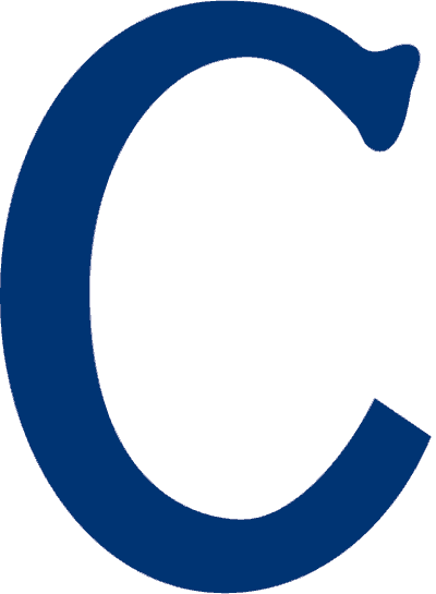 Ancien logo des Canadiens de Montréal.